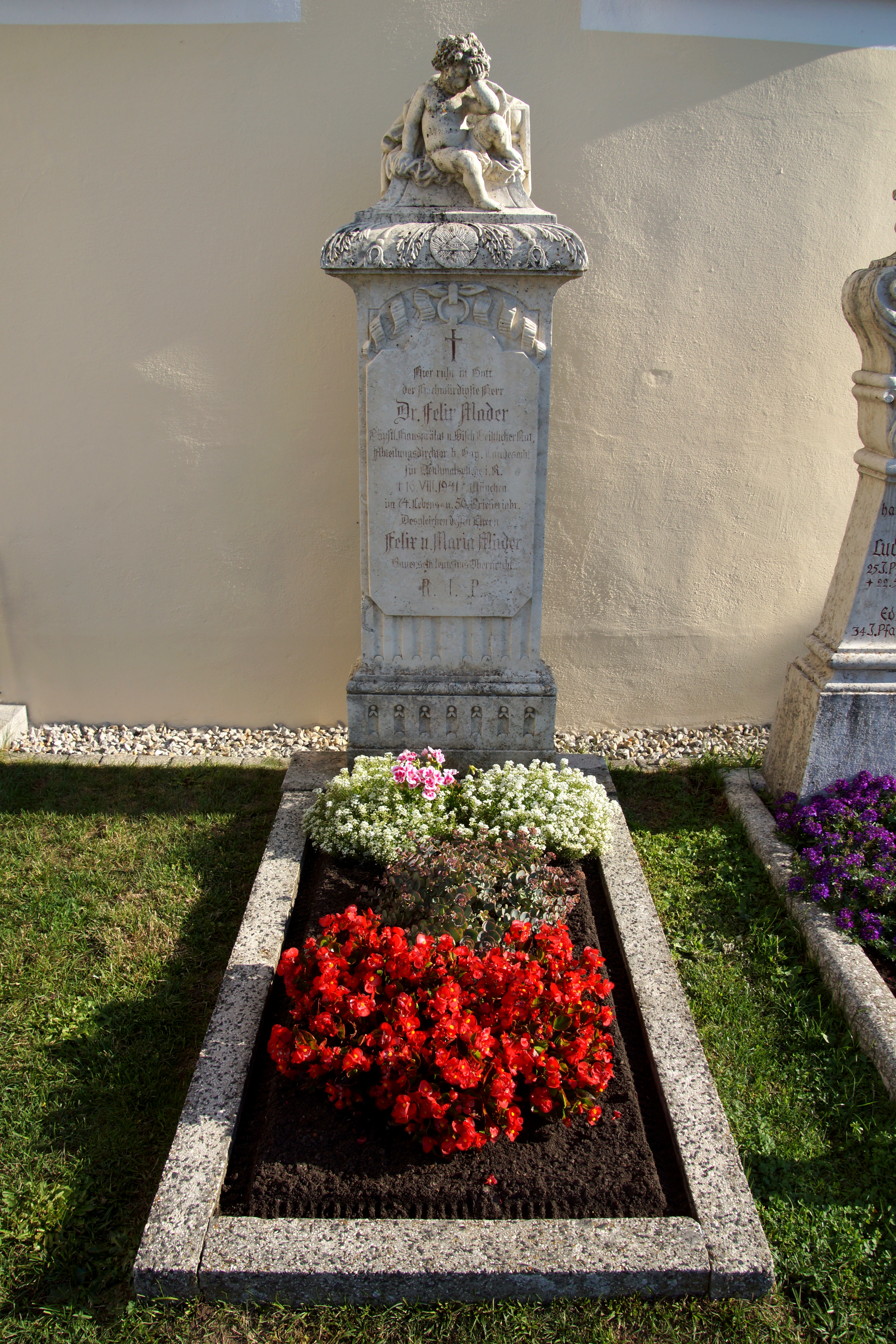 Die katholische Pfarrkirche St. Gangolf in Burggriesbach bei Freystadt in der Oberpfalz